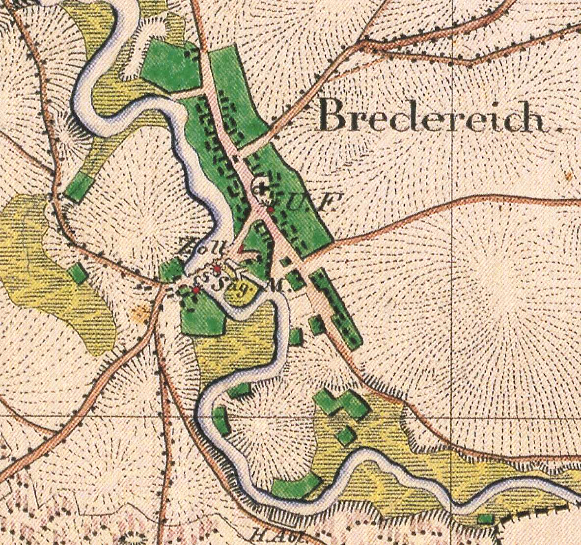 Alttymen, OT von Fürstenberg/Havel, Lkr. Oberhavel, Brandenburg, Ausschnitt aus dem Urmesstischblatt Blatt 2845 Bredereiche von 1825 mit der Schleuse Bredereiche in der Havel.